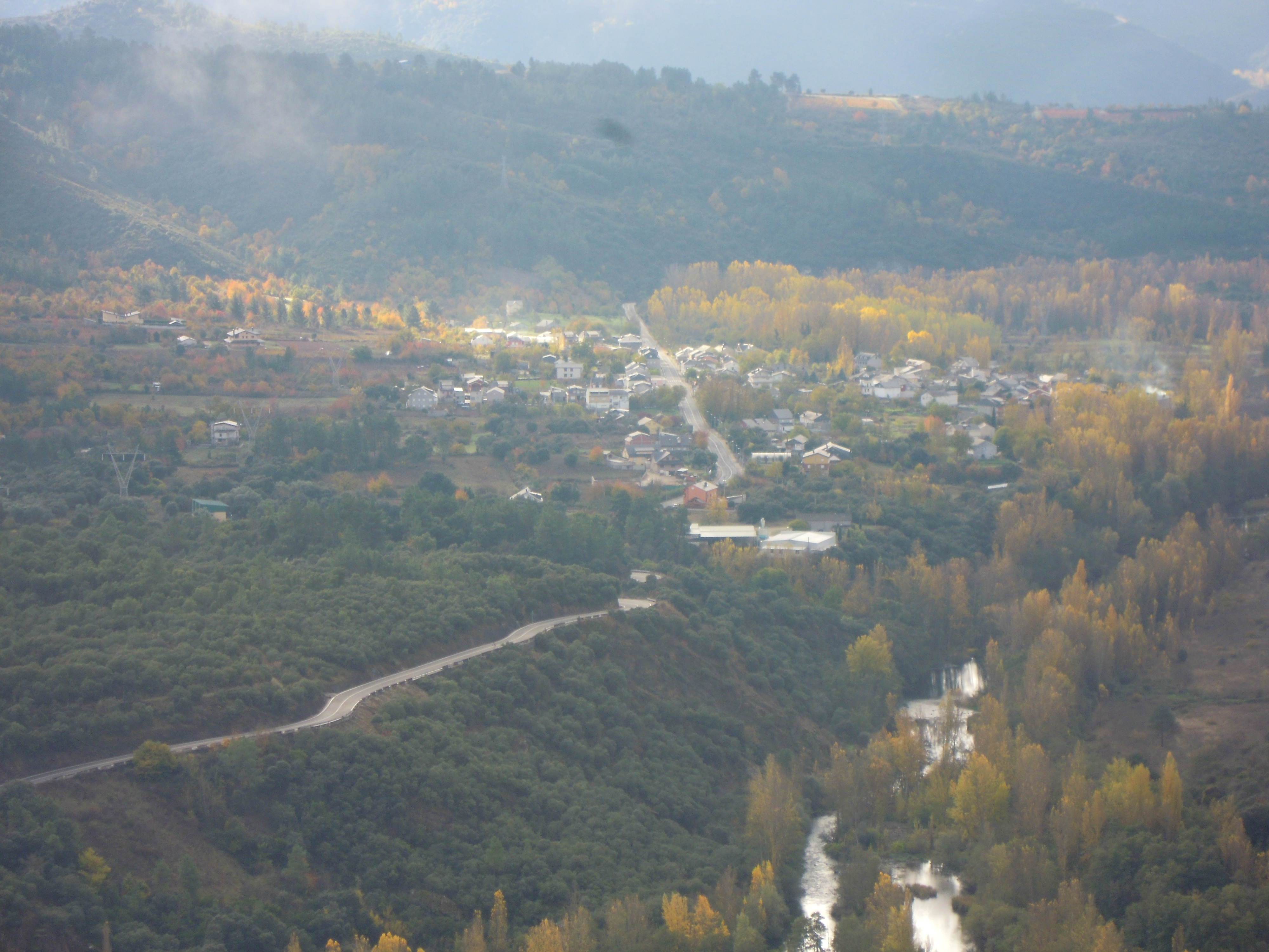 Vista xeral de Salas de la Ribera (A Ponte de Domingo Flórez), entre a estrada N-536 e o río Sil